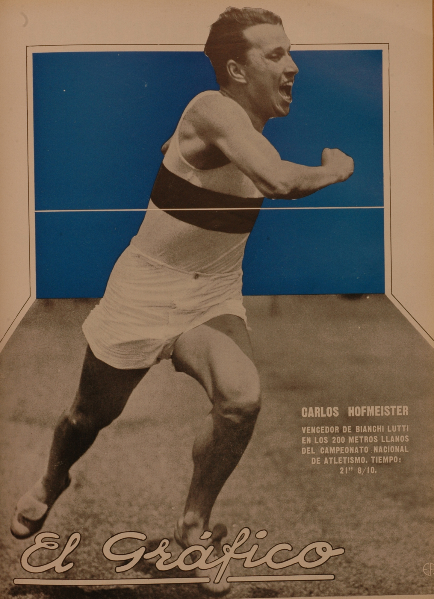 El Grafico del 19 de Diciembre de 1931. Edicion 649